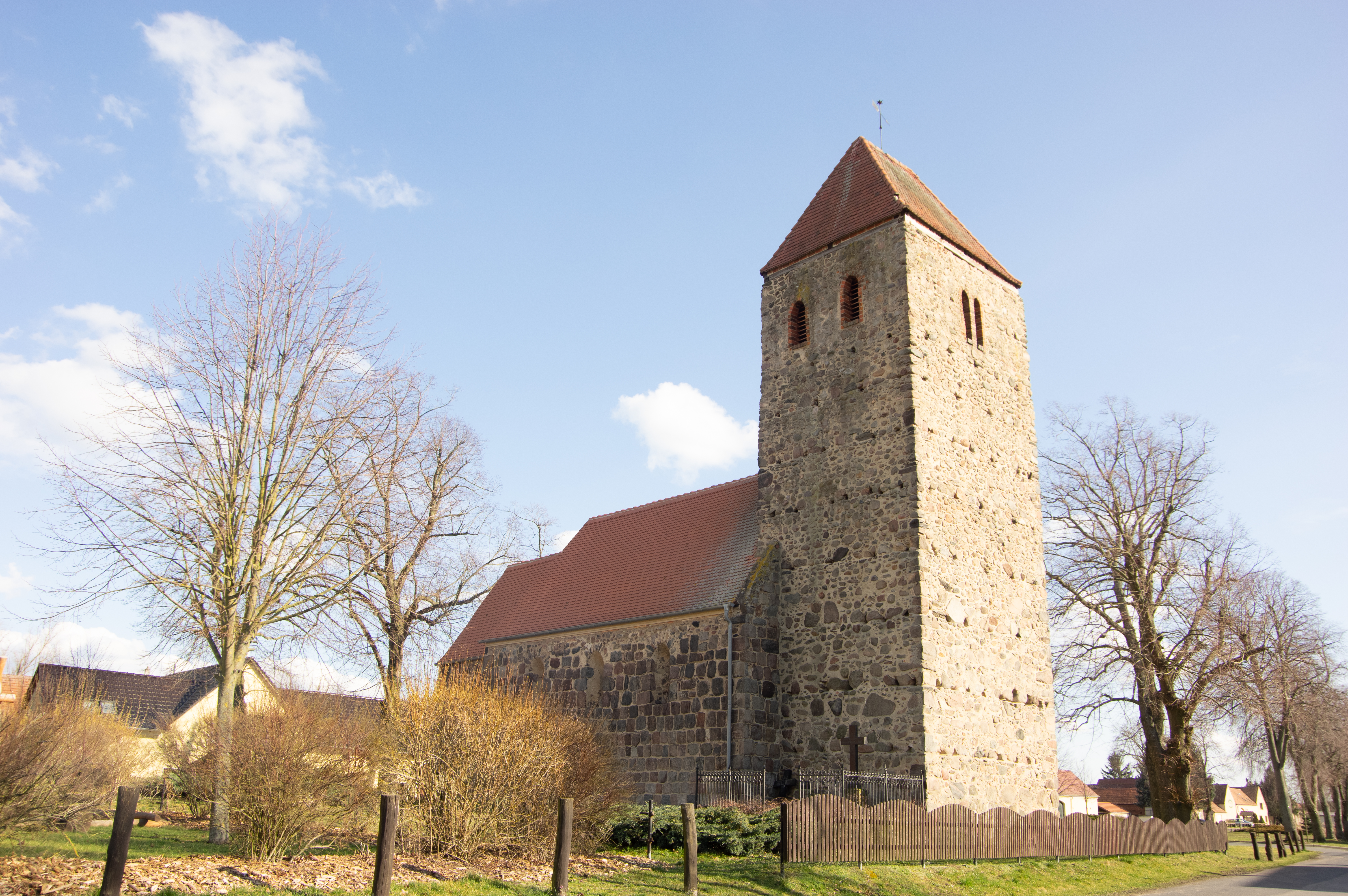 Ihlow, Ortsteil Riethof in Brandenburg. Die Dorfkirche steht unter Denkmalschutz.